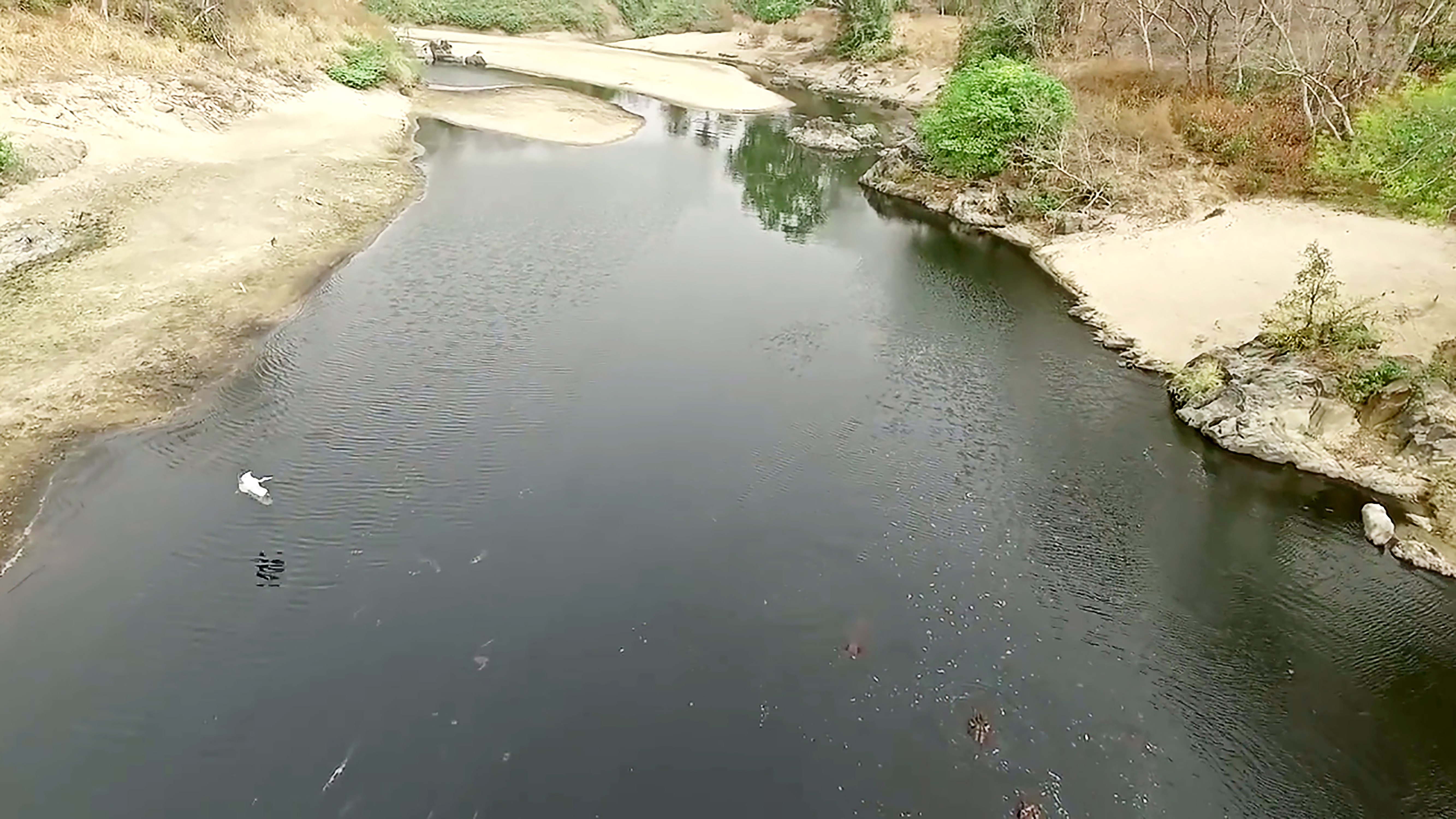 Le parc national de la Benoué est situé dans la région du Nord Cameroun